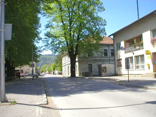 Plaški centar